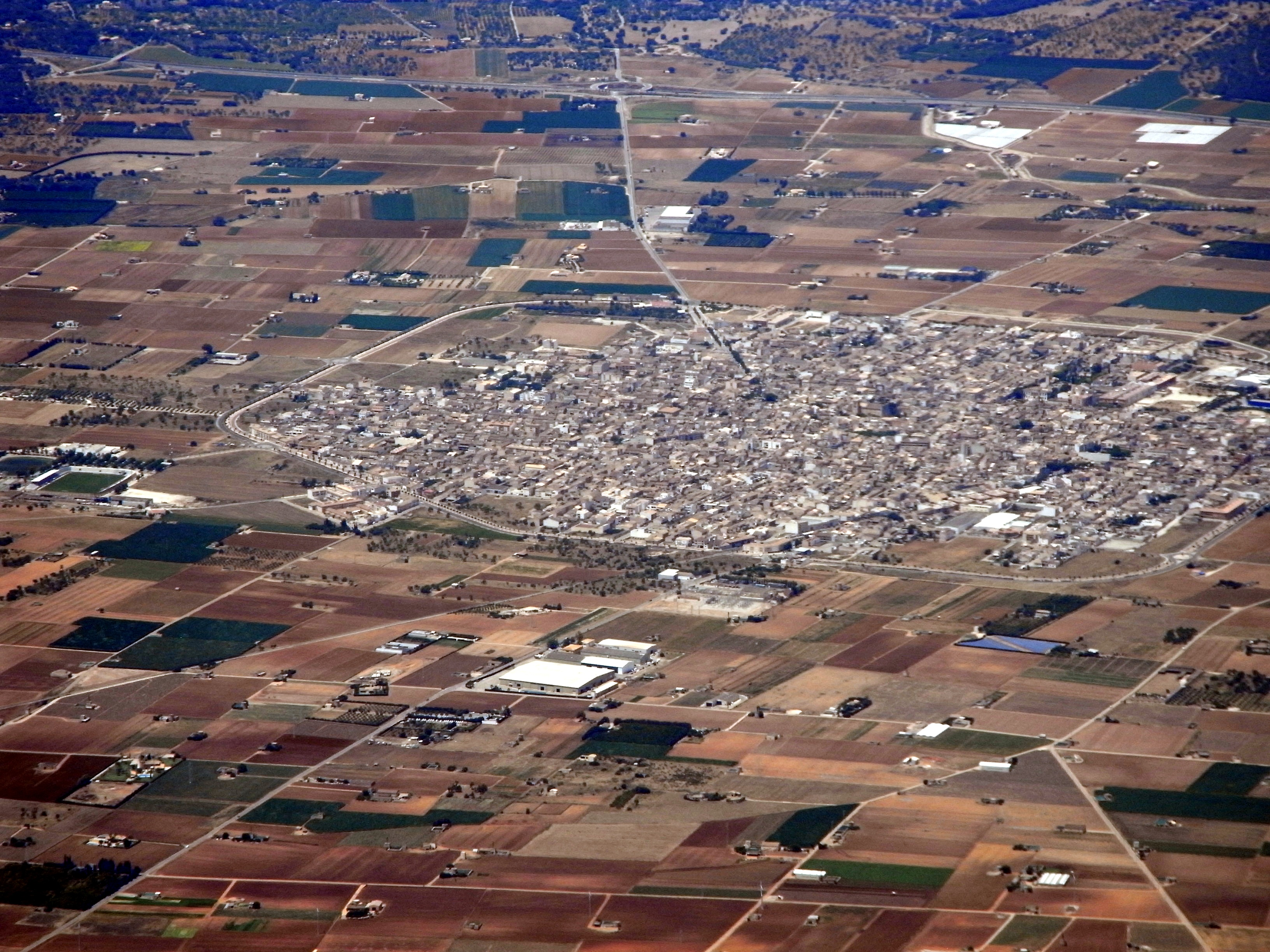 Sa Pobla (Mallorca) von Südosten gesehen.